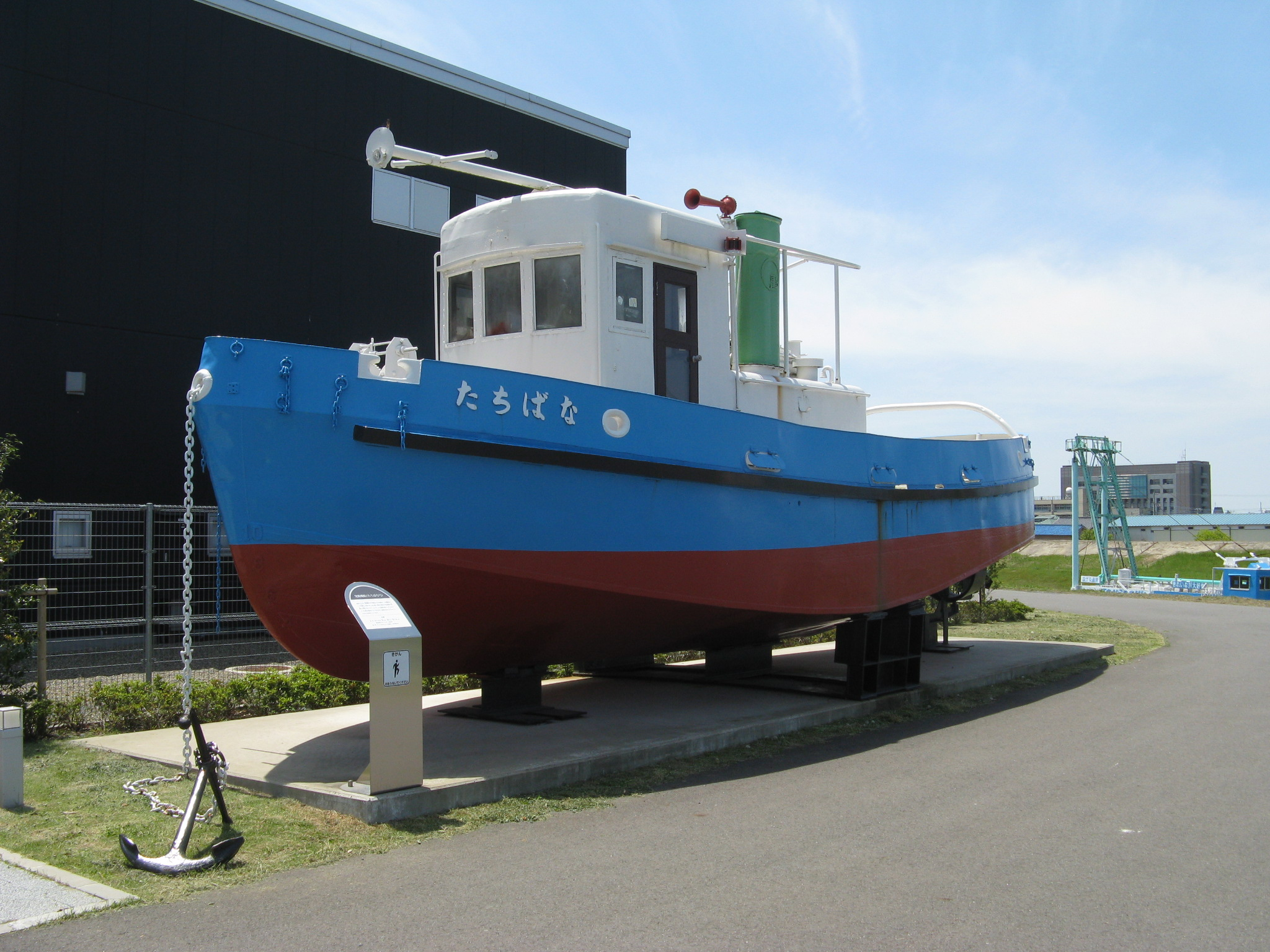 発動機船たちばな 千葉県香取市の水の郷さわらにて